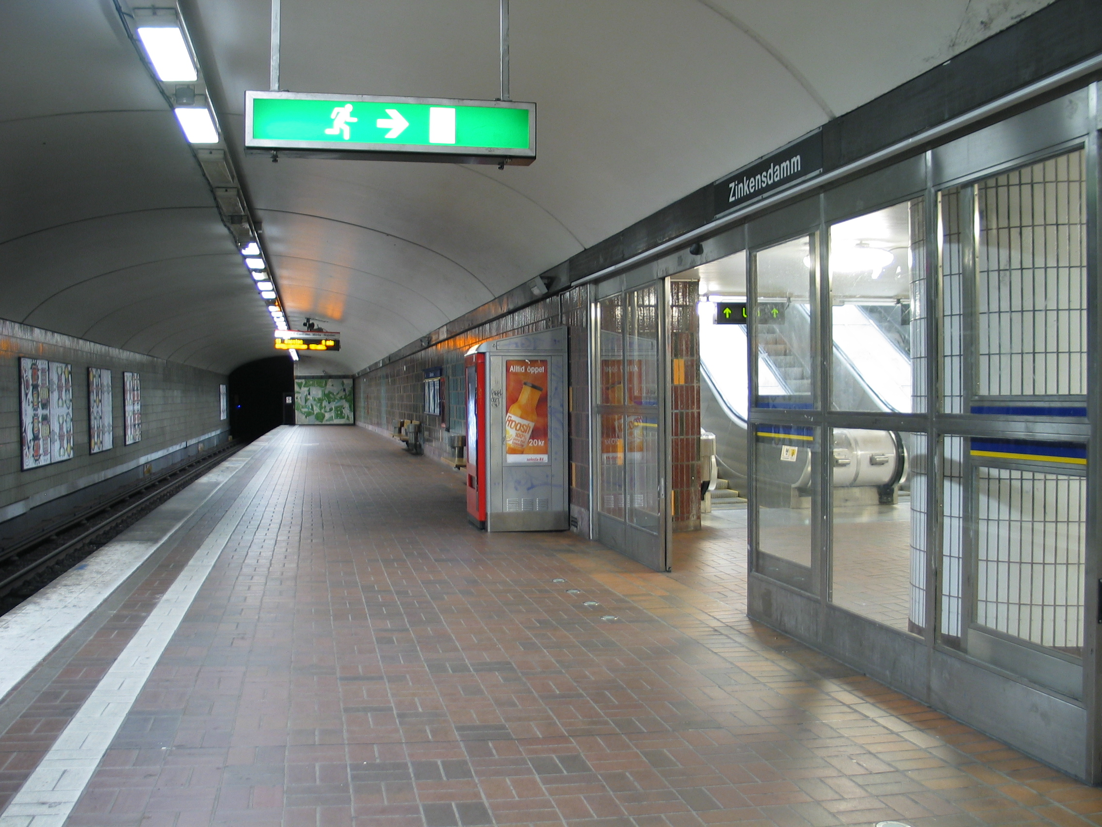 Zinkensdamm, a metro station in Stockholm, Sweden.